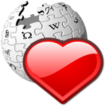 Wikilove